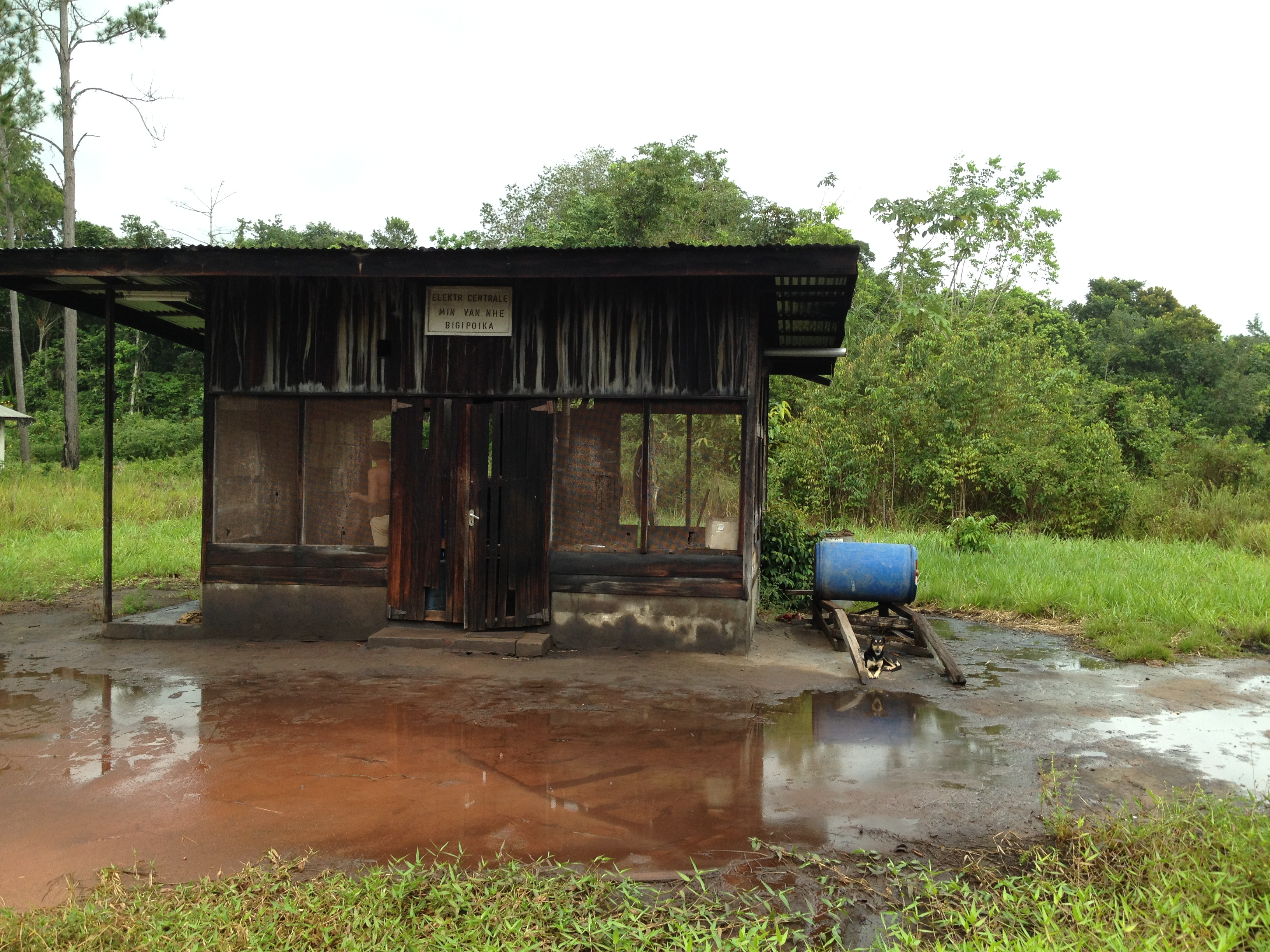 Het generator station van Bigi Poika, dagelijks is er een paar uur stroom, door de weeks tot 20 uur, op zaterdag tot 24 uur